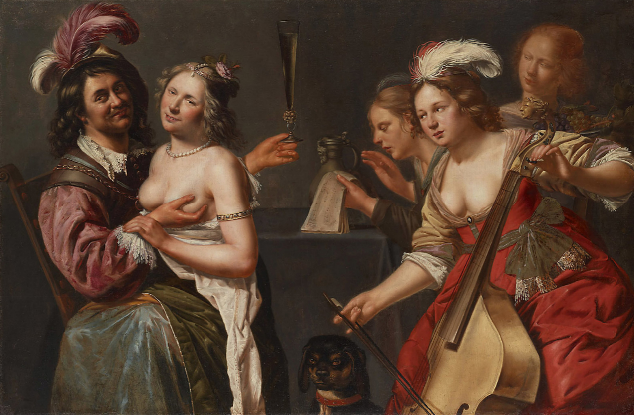 Darstellung der biblischen Geschichte vom verlorenen Sohn der sein Erbe bei den Huren verprasst.